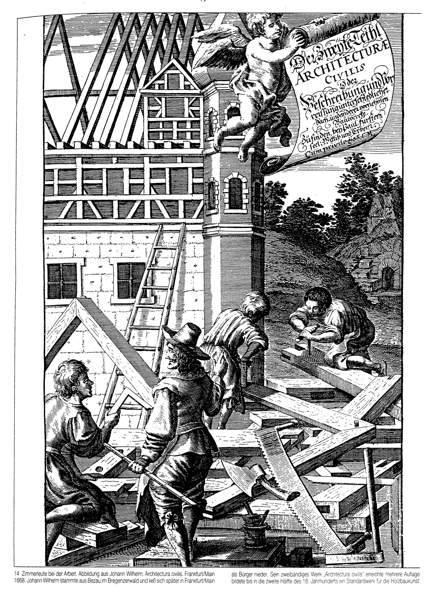 Johann Wilhelm, Bezau 1595